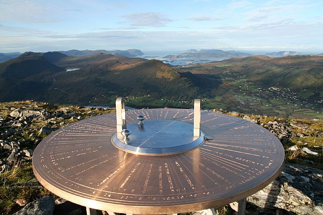 Retningsskiva på Melshornet.